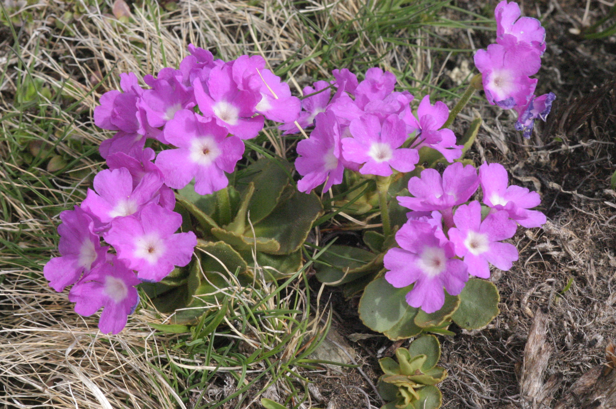 Primula villosa (Zottige Primel) Aufnahmeort: Nockberge, Kärnten, Austria